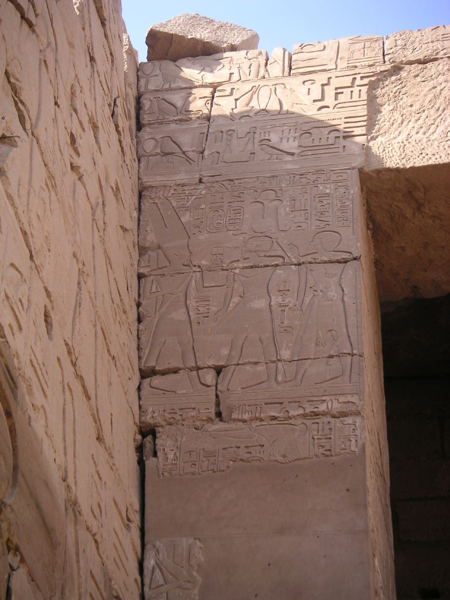 Relief au nom de Sheshonq Ier et de son fils, le grand prêtre d'Amon, Ioupout - XXIIe dynastie égyptienne - Karnak, temple d'Amon-Rê